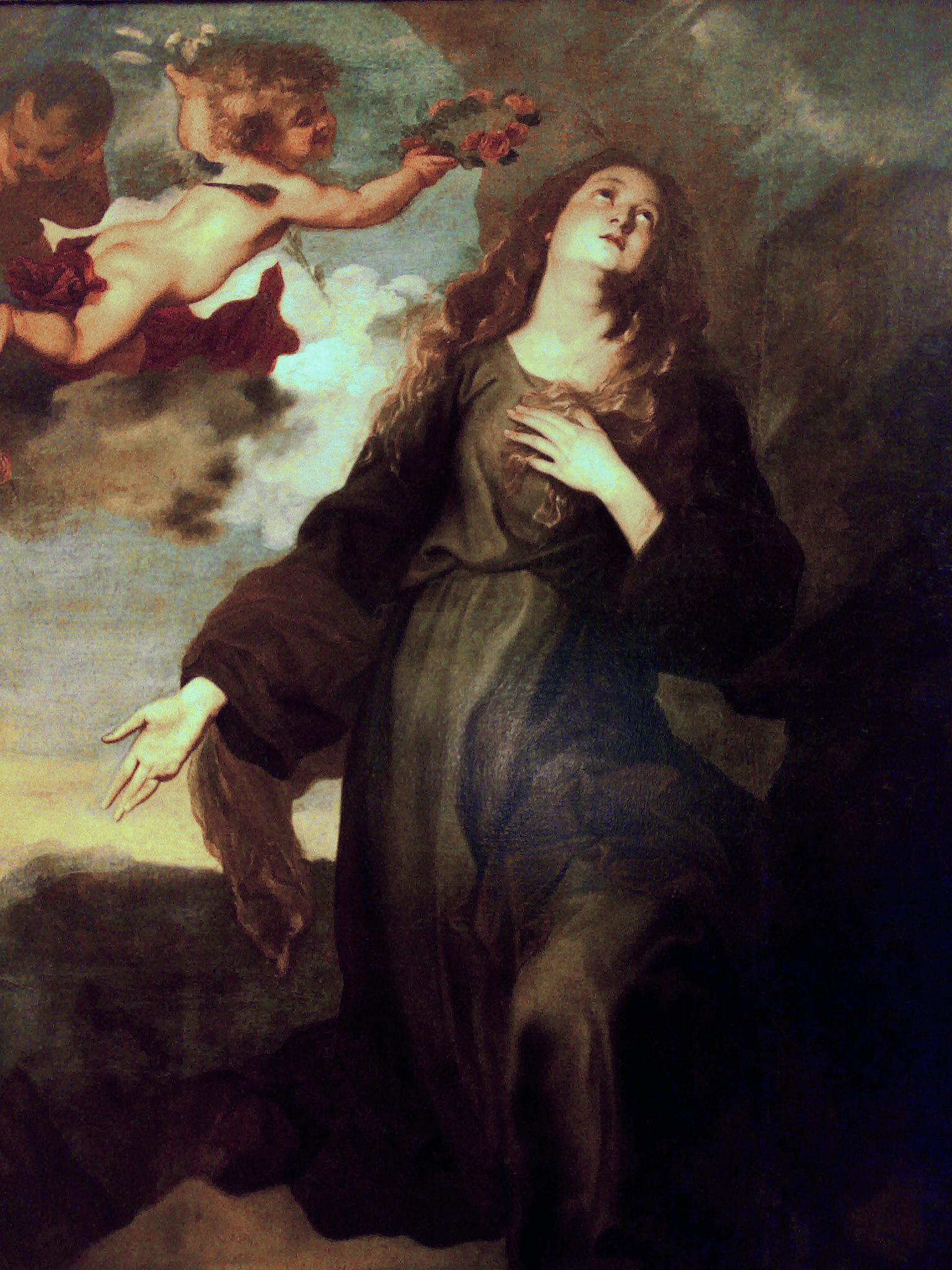 St. Rosalie in Glorylabel QS:Len,"St. Rosalie in Glory" label QS:Lit,"Santa Rosalia incoronata dagli angeli"